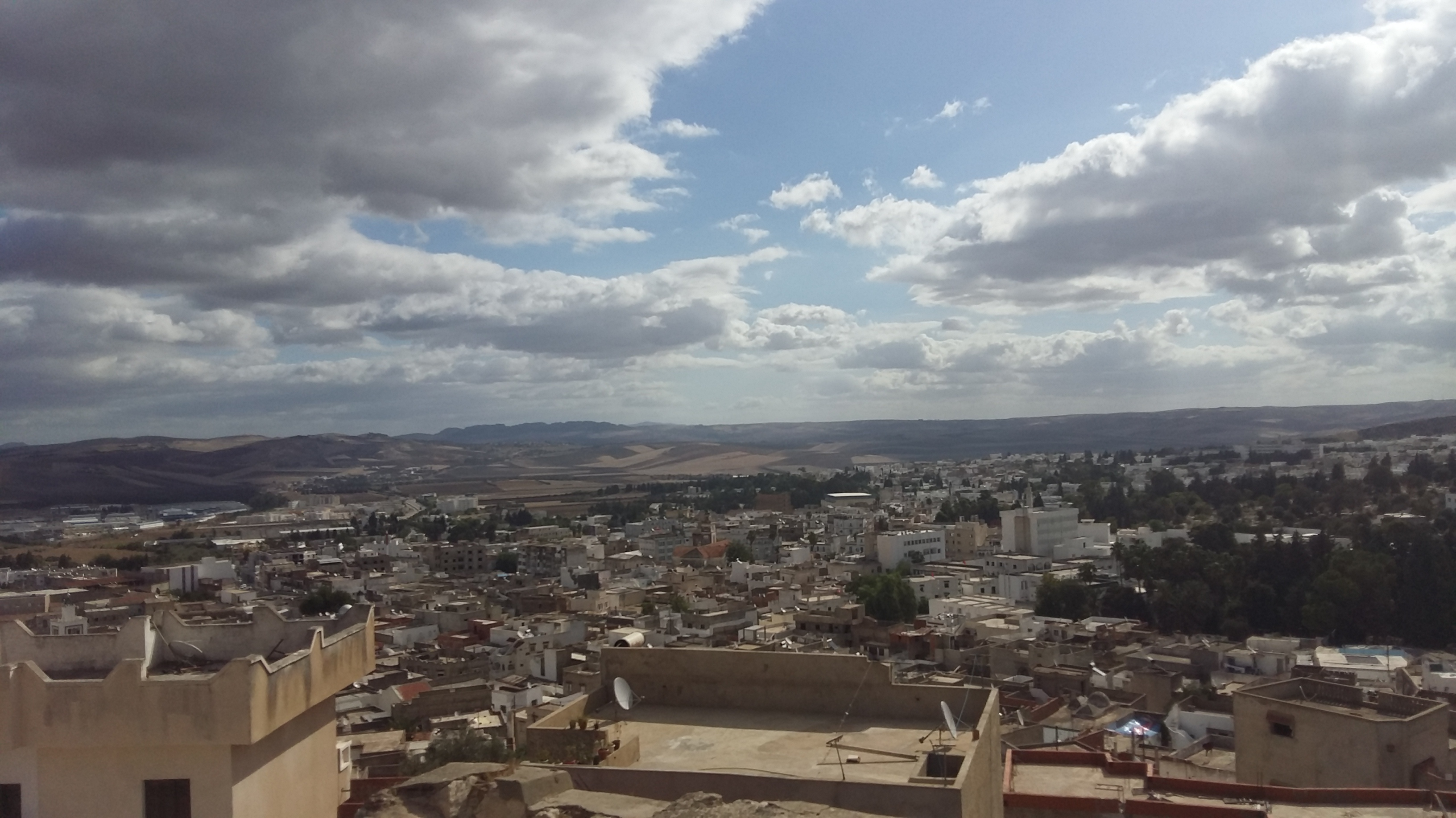 Vue de Béja depuis les fortifications